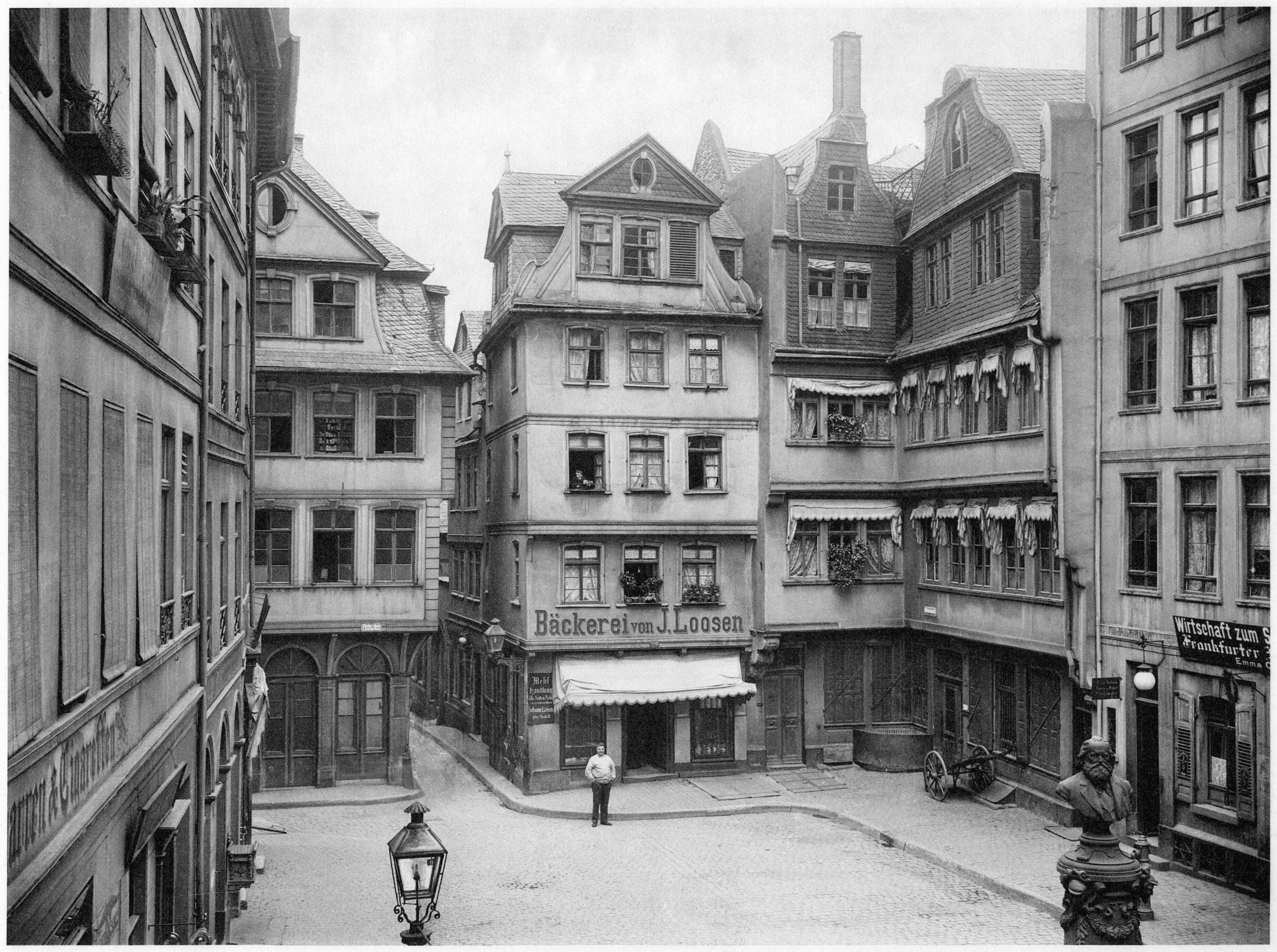 Unter dem Namen Hühnermarkt versteht man das viereckige Plätzchen, das sich bei dem südlichen Auslauf der Neugasse zeigt. Dieses Plätzchen hat vor Zeiten den Namen Vrithof (wohl von Vriten, einfriedigen) und Vreithof geführt, über dessen Herkunft und Bedeutung viel gestritten worden ist. Seinen späteren Namen Hühnermarkt hat es, weil in der Tat hier bis um Mitte des vorigen Jahrhunderts der Hühner-, resp. Geflügelmarkt abgehalten wurde. Auf dem Plätzchen stand ein interessannter Brunnen, der aber später einem andern Platz machte, dem sogenannten Freiheitsbrunnen, da aus missverstandener Deutung eine Figur mit der Freiheitsmütze darauf angebracht war. Dieser Brunnen ist auf das Plätzchen am Archiv versetzt und auf dem Hühnermarkt steht jetzt zugleich in Form eines Brunnens das Stoltze-Denkmal von Bildhauer Schierholz. Auf dem Hühnermarkt war vor Zeiten auch die Butterwage aufgestellt.Von den Häusern, die das Plätzchen umgeben, möge das Eckhaus der Strasse „Hinter dem Lämmchen“ und der Neugasse, das jetzige Andreae'sche Haus, in welchem die aus Goethe's Zeit bekannte Tante Melber, wohnte und das Haus „zum Schildknecht“, nachmals auch St. Marcus oder „Schuhhaus“ benannt, angeführt sein. Das letztere bildet das Haus, das den Winkel rechts im Plätzchen einnimmt und die Nummer 18 trägt. Es war eine Zeit lang die Zunftstube der Schuhmacher und der heilige St. Marcus war in Lebensgrösse an dem Hause abgebildet.